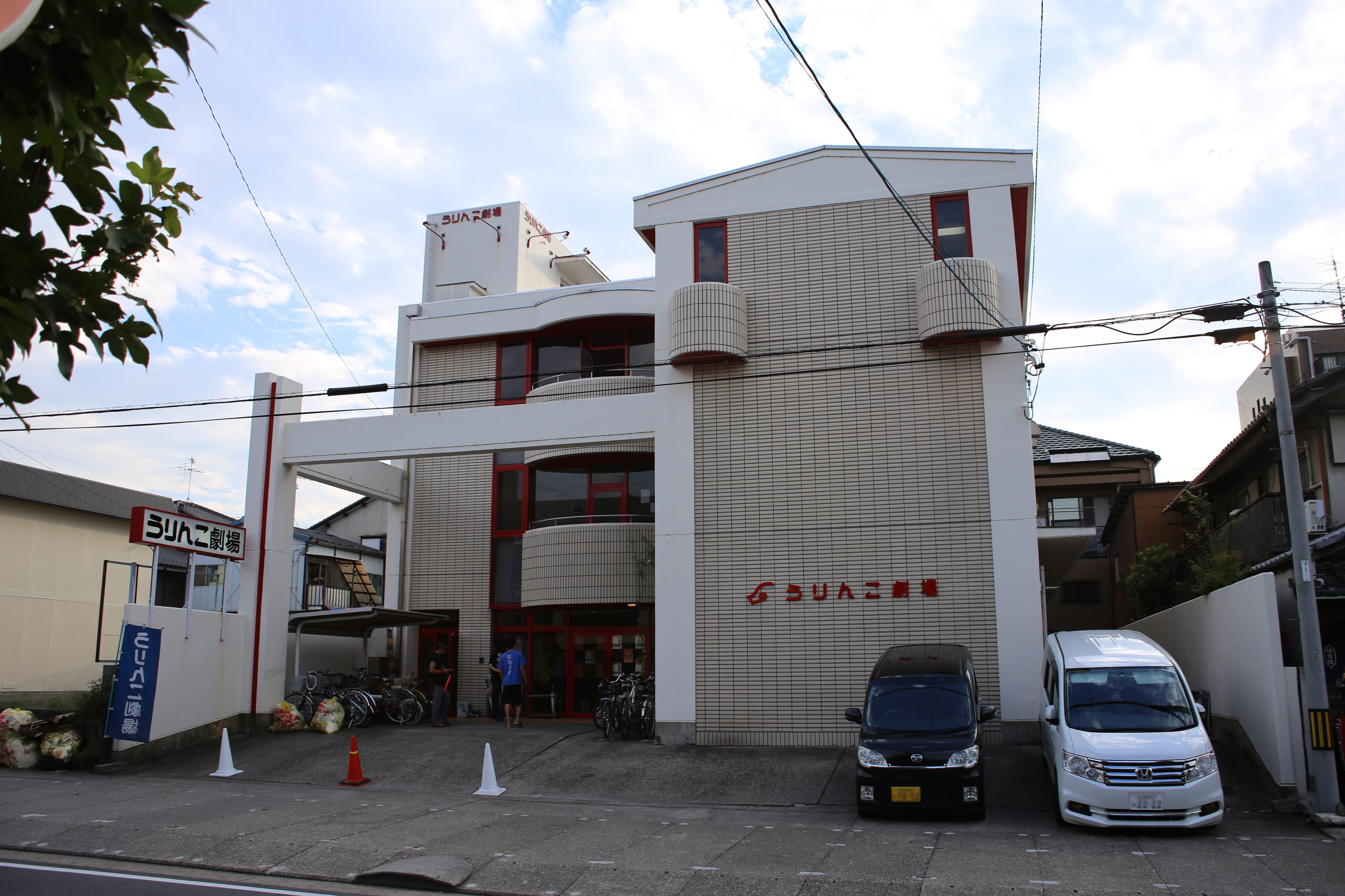 名古屋市名東区八前の劇団うりんこ「うりんこ劇場」